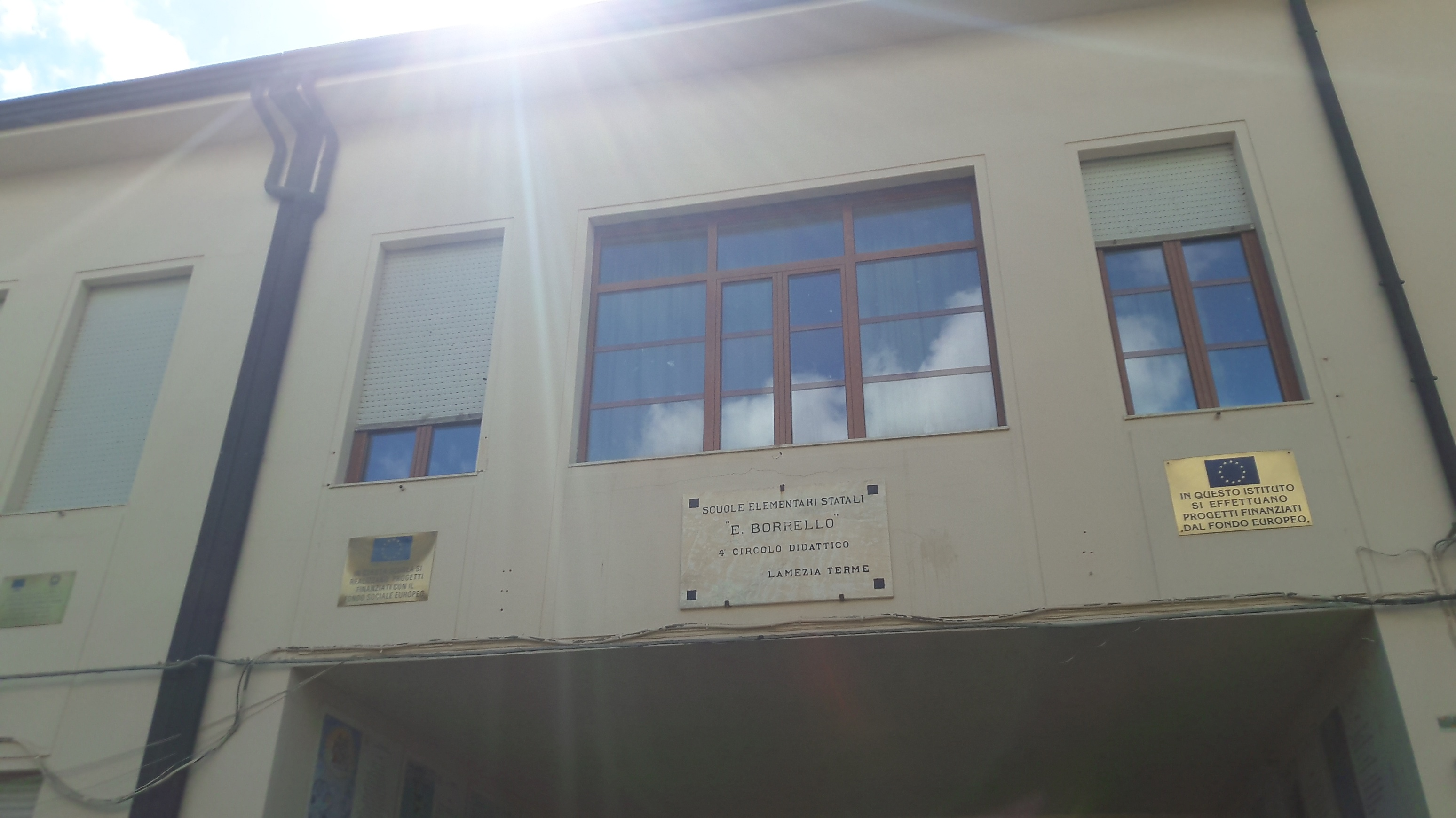 Edificio scolastico "Enrico Borrello"